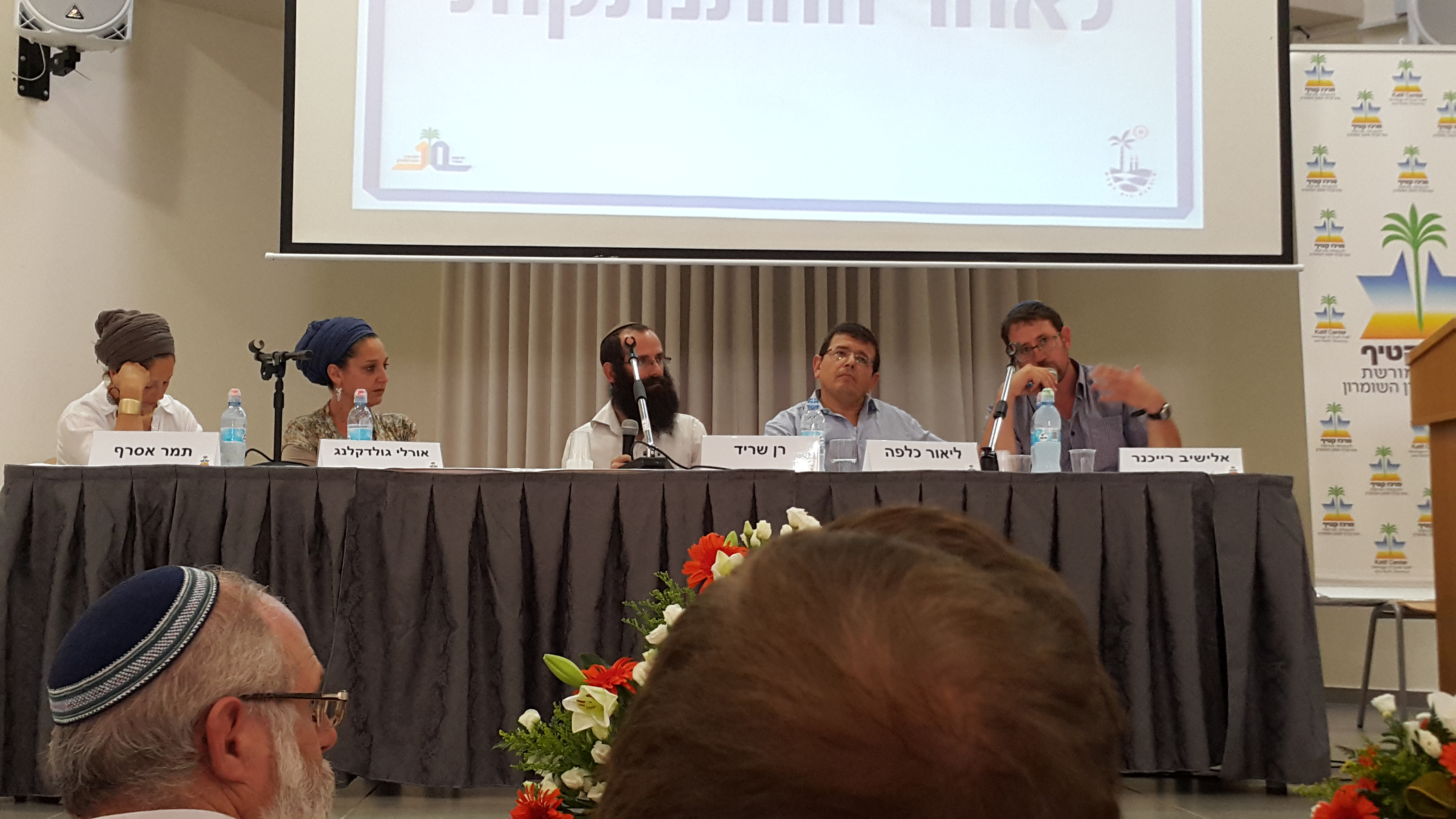 אלישיב רייכנר, רן שריד, אורלי גולדקלנג, ליאור כלפה ותמר אסרף